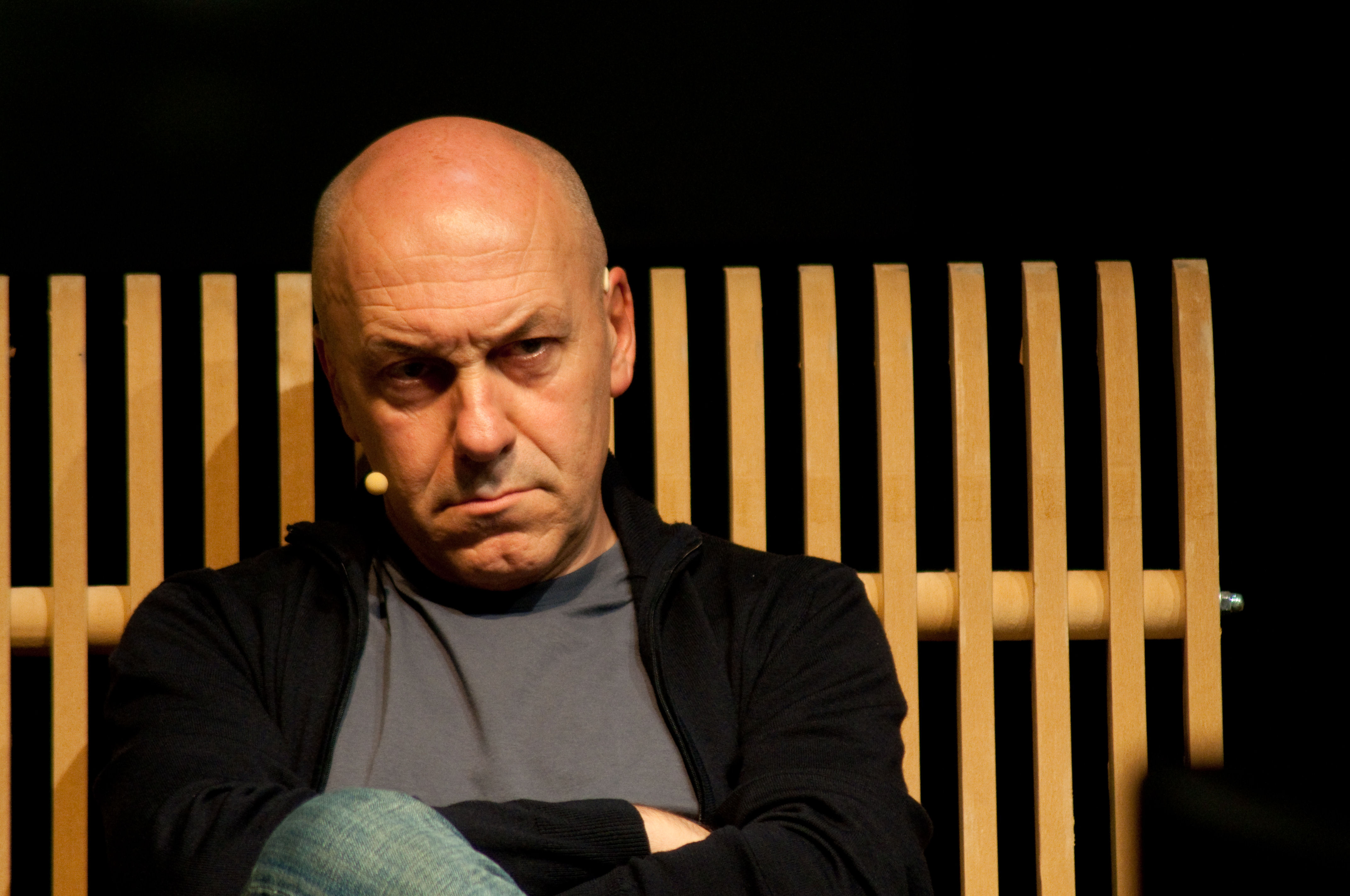 Claudio Velardi a BTO - BUY TOURISM ONLINE 2010 alla Stazione Leopolda di Firenze.